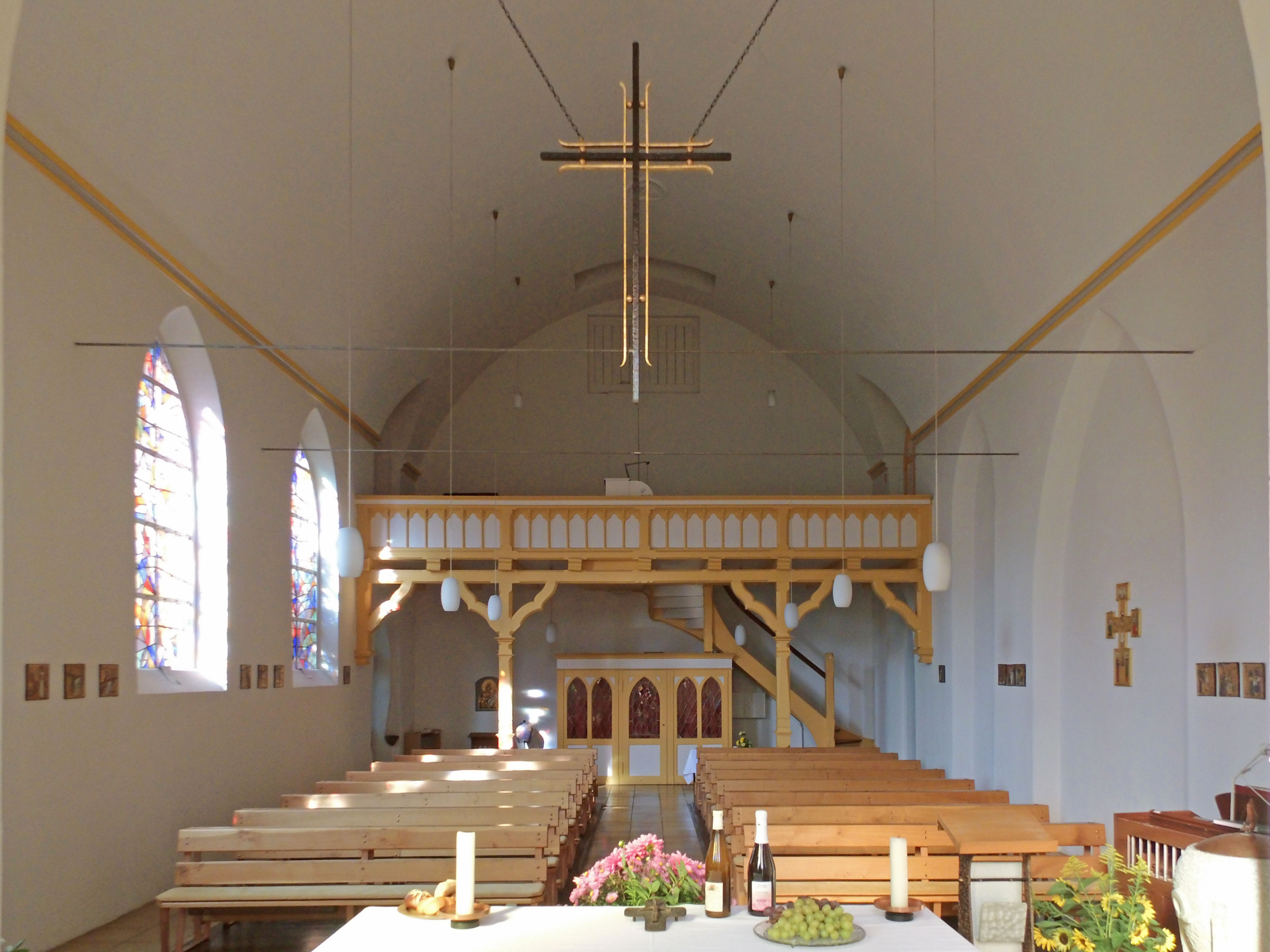 Katholische Herz-Jesu-Kirche in Großalsleben, Blick zur Orgelempore.